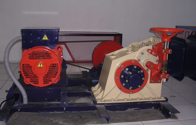 Pembangkit listrik tenaga mikrohidro tipe crossflow